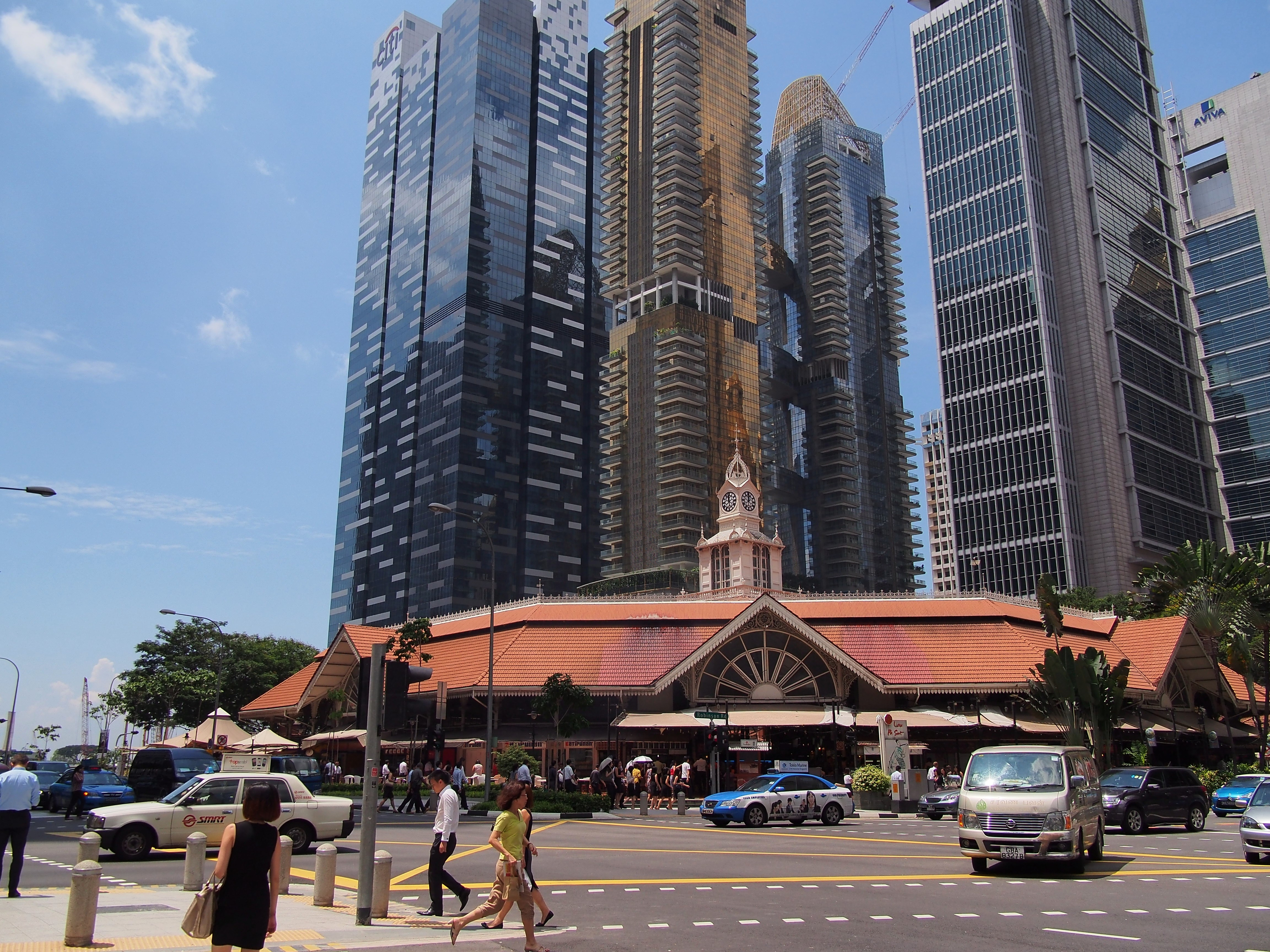 Lau Pa Sat - 2013.04